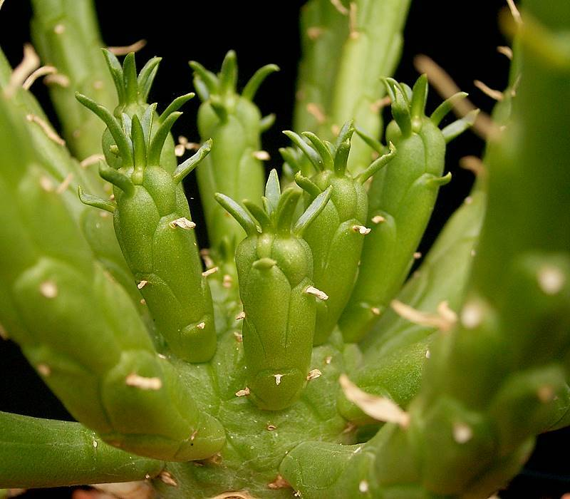 Euphorbia superans